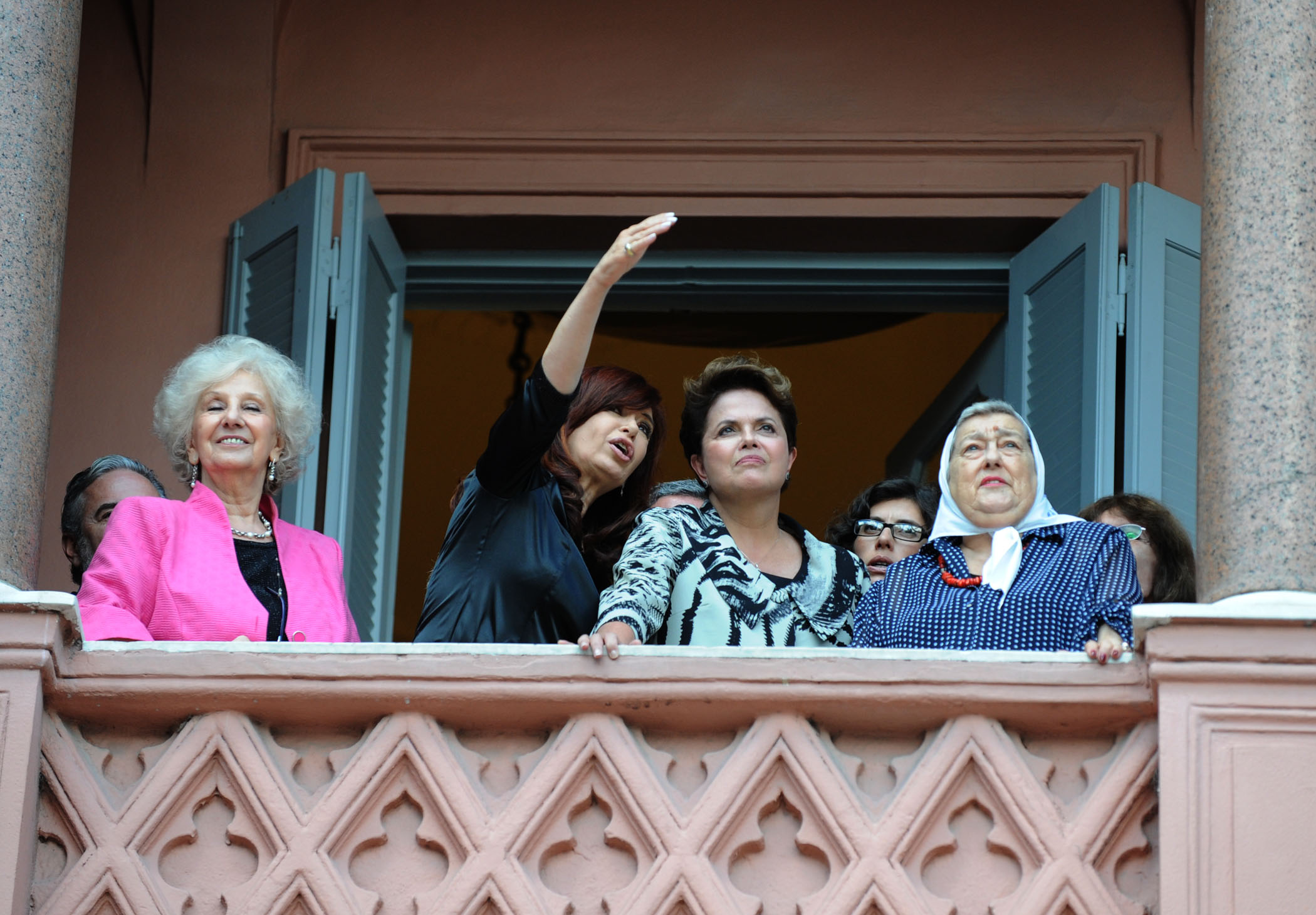 Estela de Carlotto (Abuelas de Plaza de Mayo), Dilma Rousseff, Cristina Kirchner y Hebe de Bonafini (Madres de Plaza de Mayo) at the Pink House, Buenos Aires.